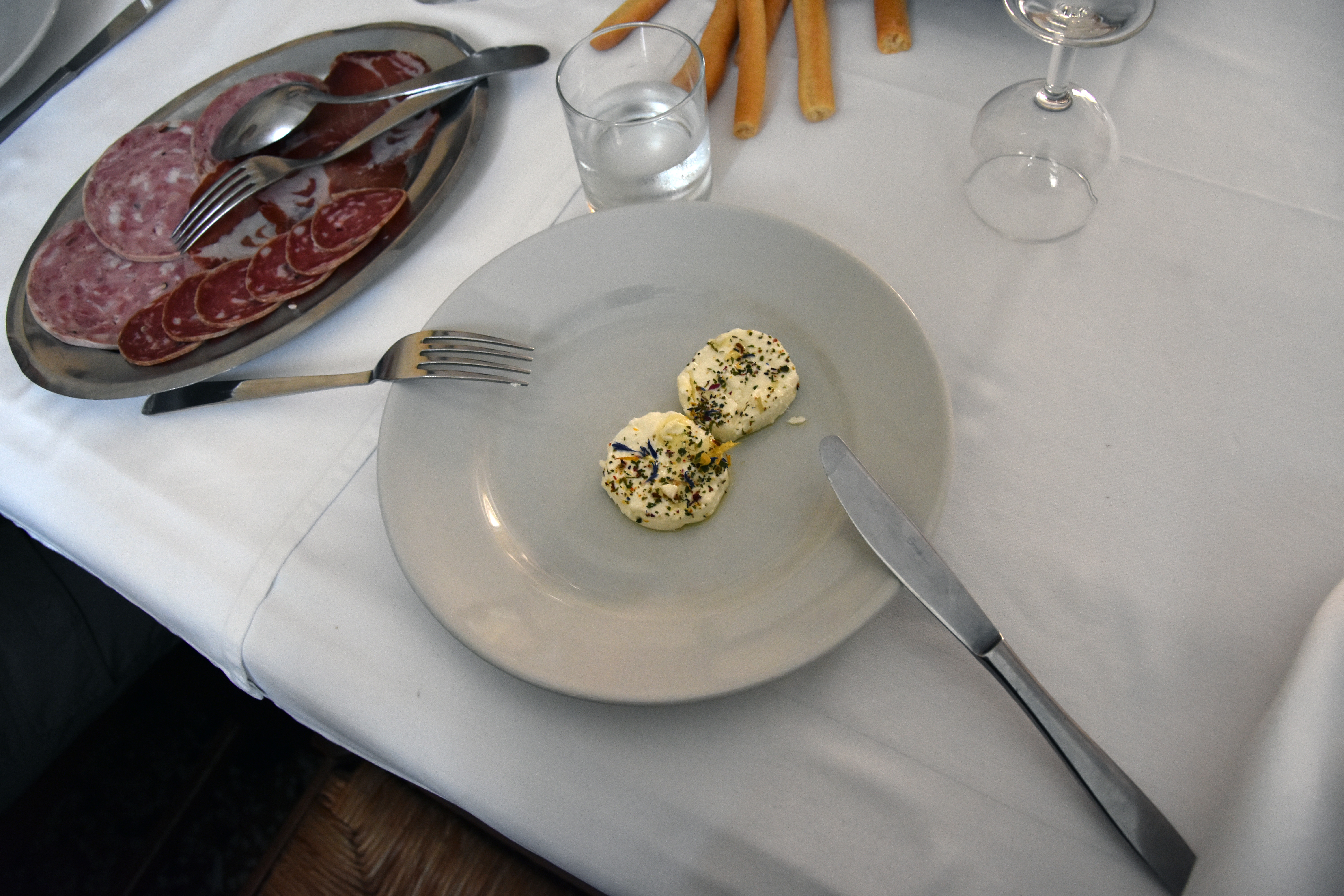 Coppia di tomini elettrici serviti come antipasto in una trattoria piemontese. Foto scattata presso il ristorante "Concordia" di San Martino Alfieri.